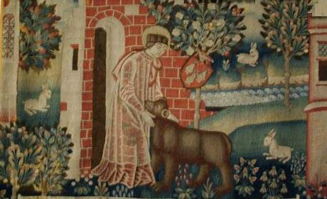 Saint-Vaast et la bête, tapisserie du XVème siècle, Musée des Beaux Arts, Arras